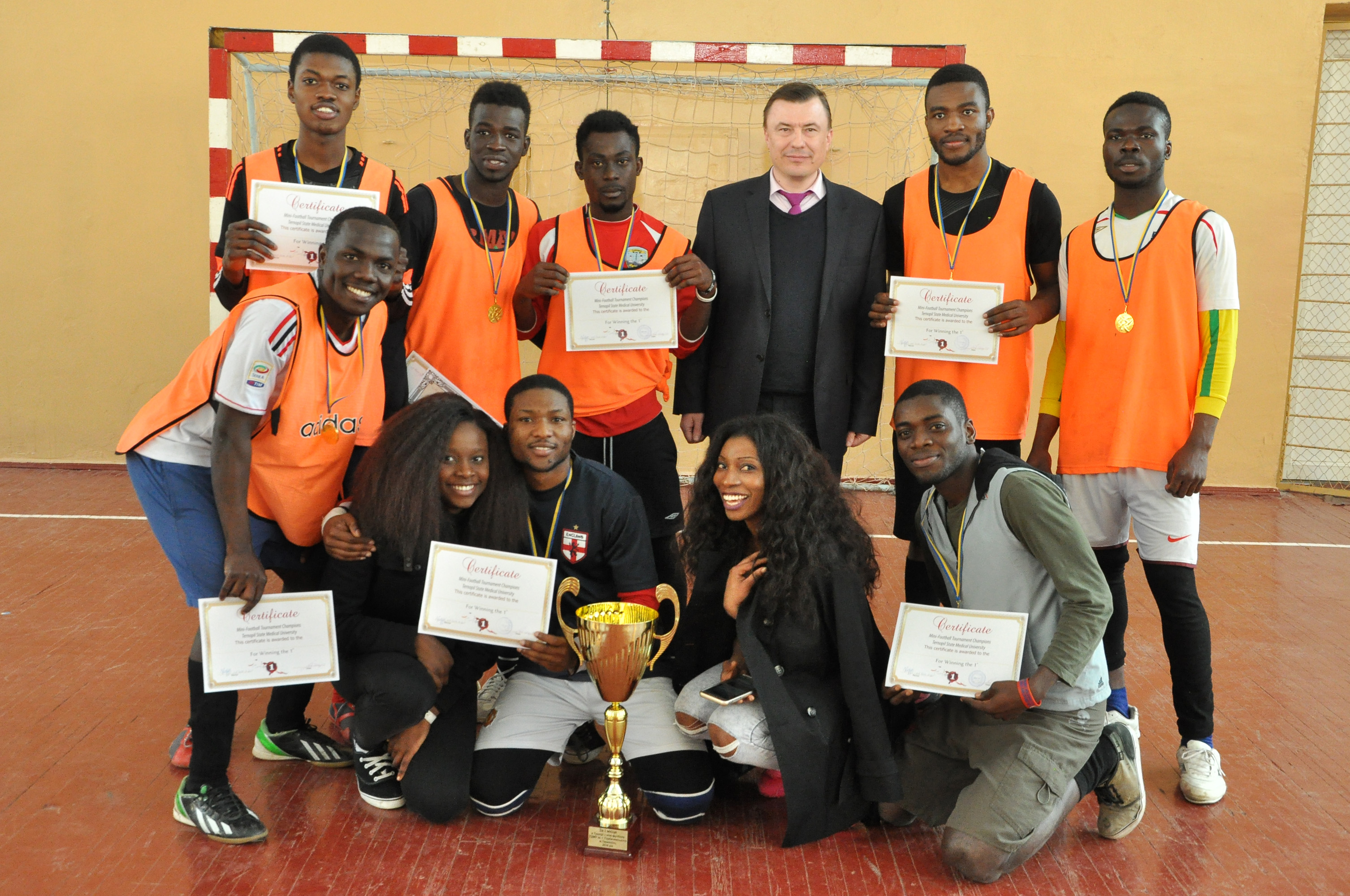 Міні-футбол «Ліга чемпіонів» Тернопільського державного медичного університету імені І. Я. Горбачевського. Півфінальні та фінальний поєдинки 26 квітня 2016 року. І місце — команда з Гани.